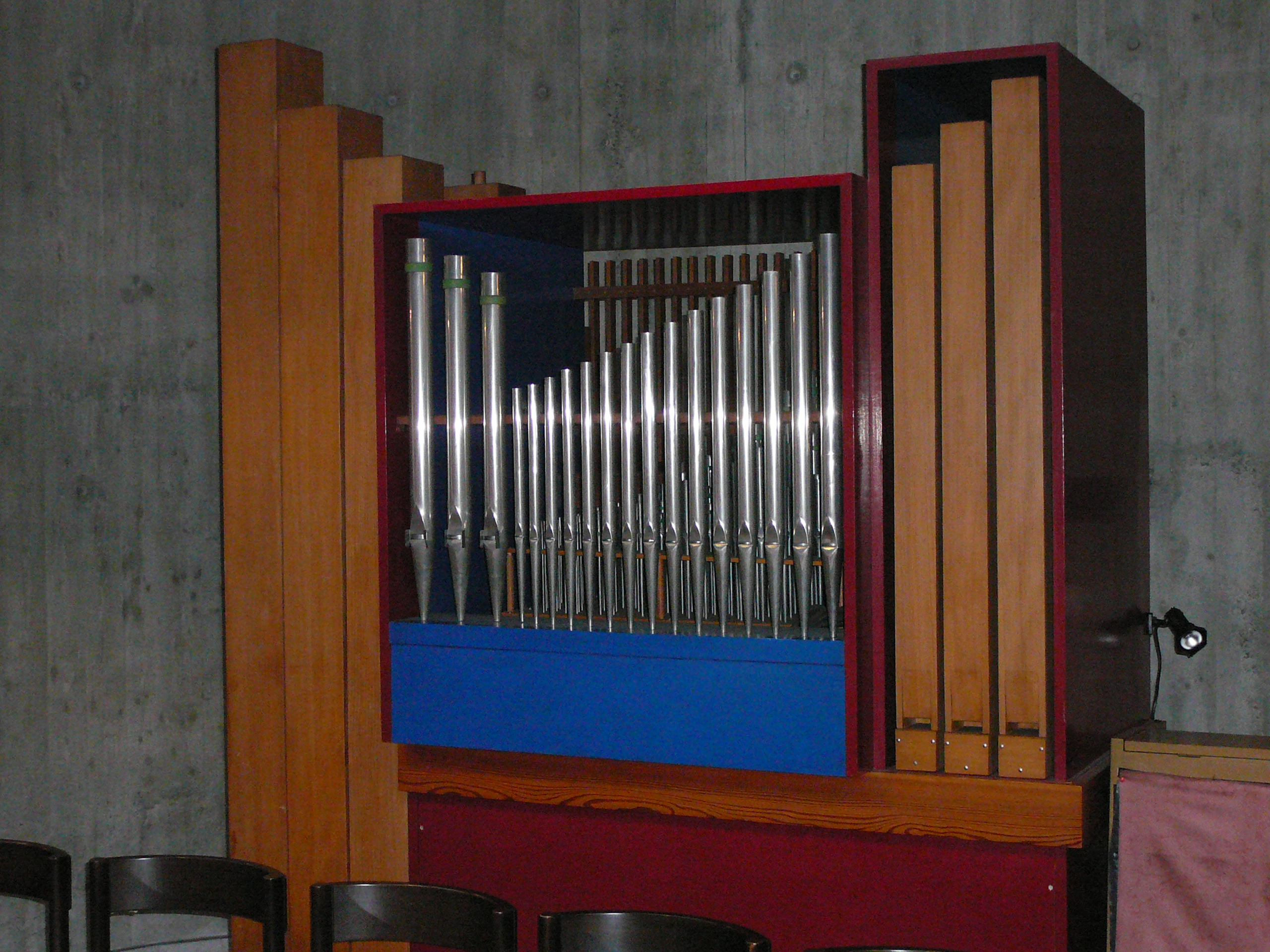 Römisch-katholische Kirche St. Mauritius Regensdorf, Orgel in Kapelle